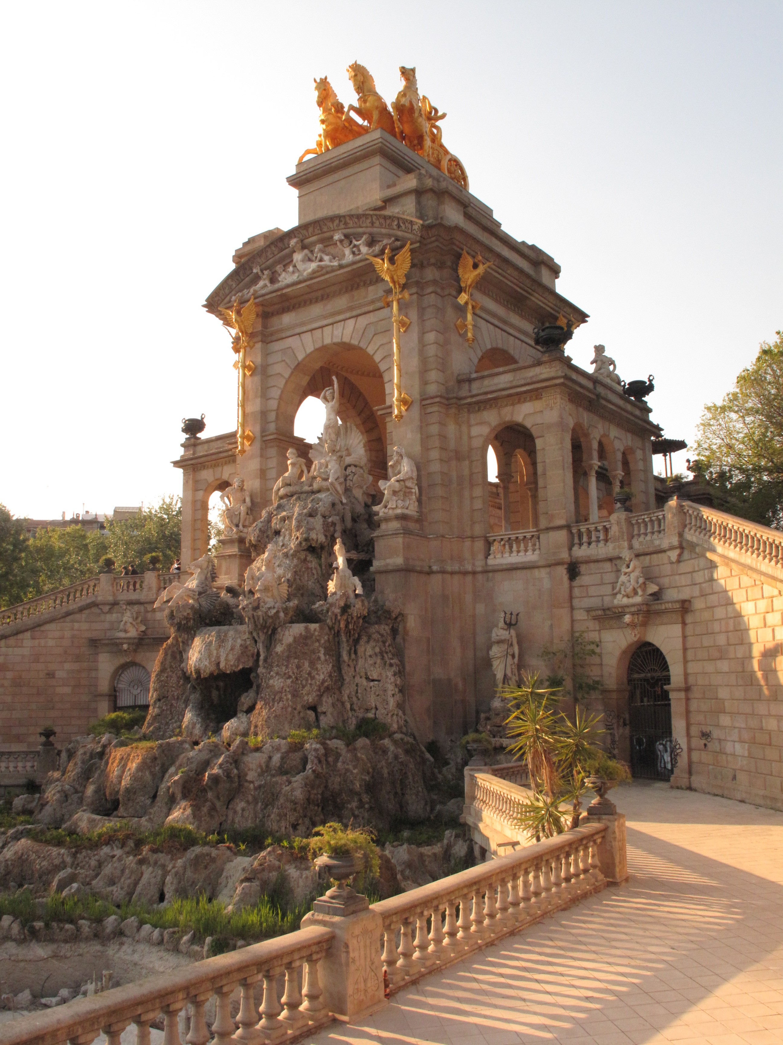 Cascada del parc de la Ciutadella, de Josep Fontserè (Barcelona)